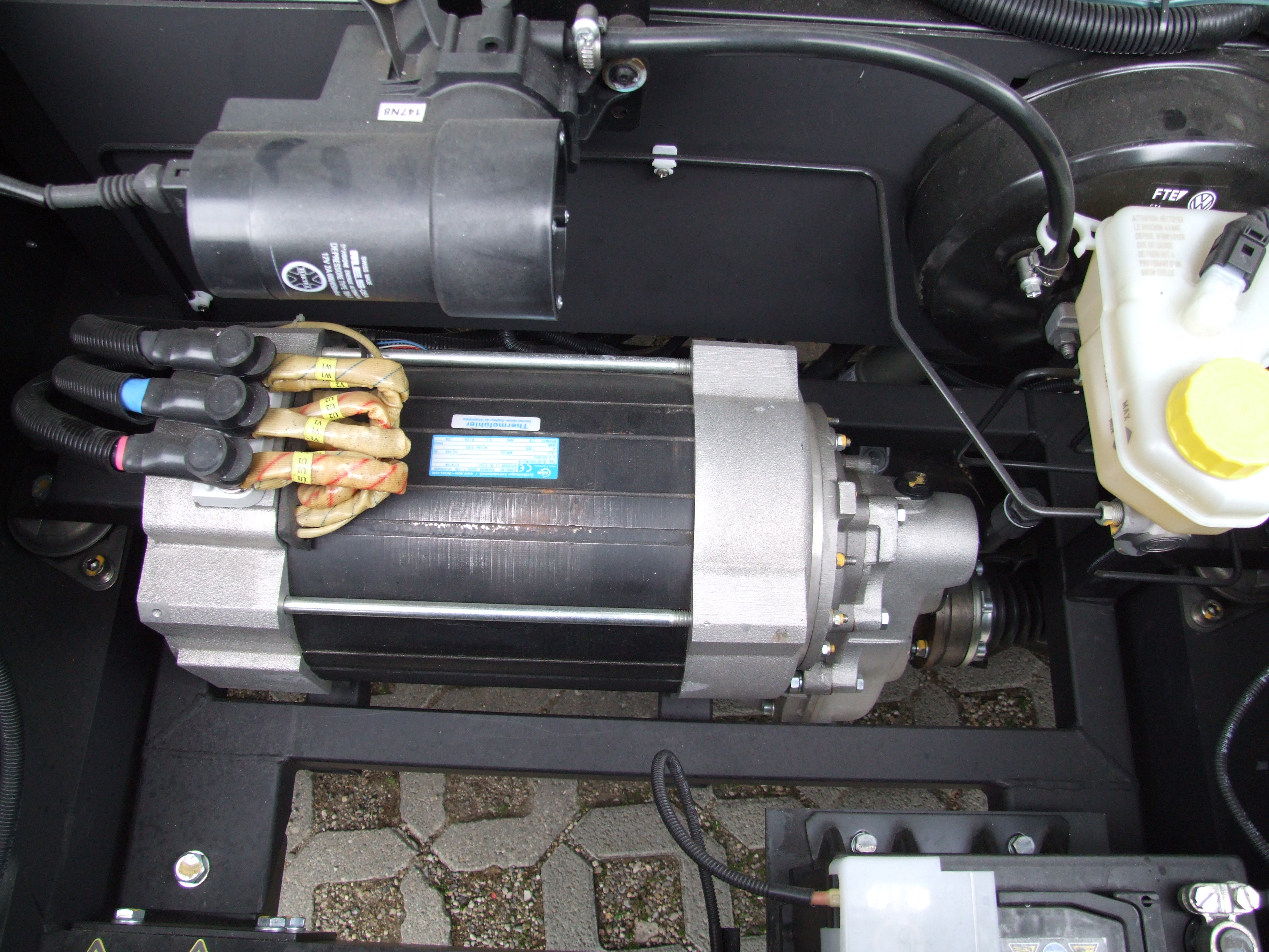 Elektromotor des Eco Carrier ES von Ecocraft, ein deutsches Elektroauto mit einer Ladekapazität von zwei Europaletten auf der Pritsche. Die Aufnahme entstand am Rande des Mannheimer Maimarkt 2010. Mit dem Ecocraft konnte ich eine Probefahrt machen. Nach einer Fahrt mit einen City EL die zweite Probefahrt mit einem E-Auto im öffentlichen Straßenverkehr.